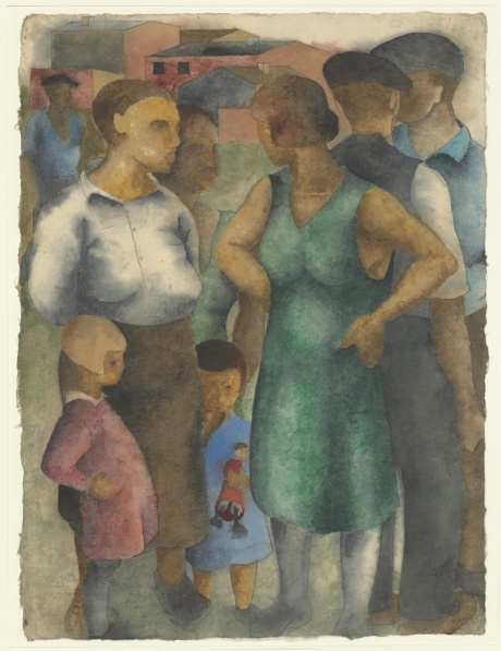 Arbeiter